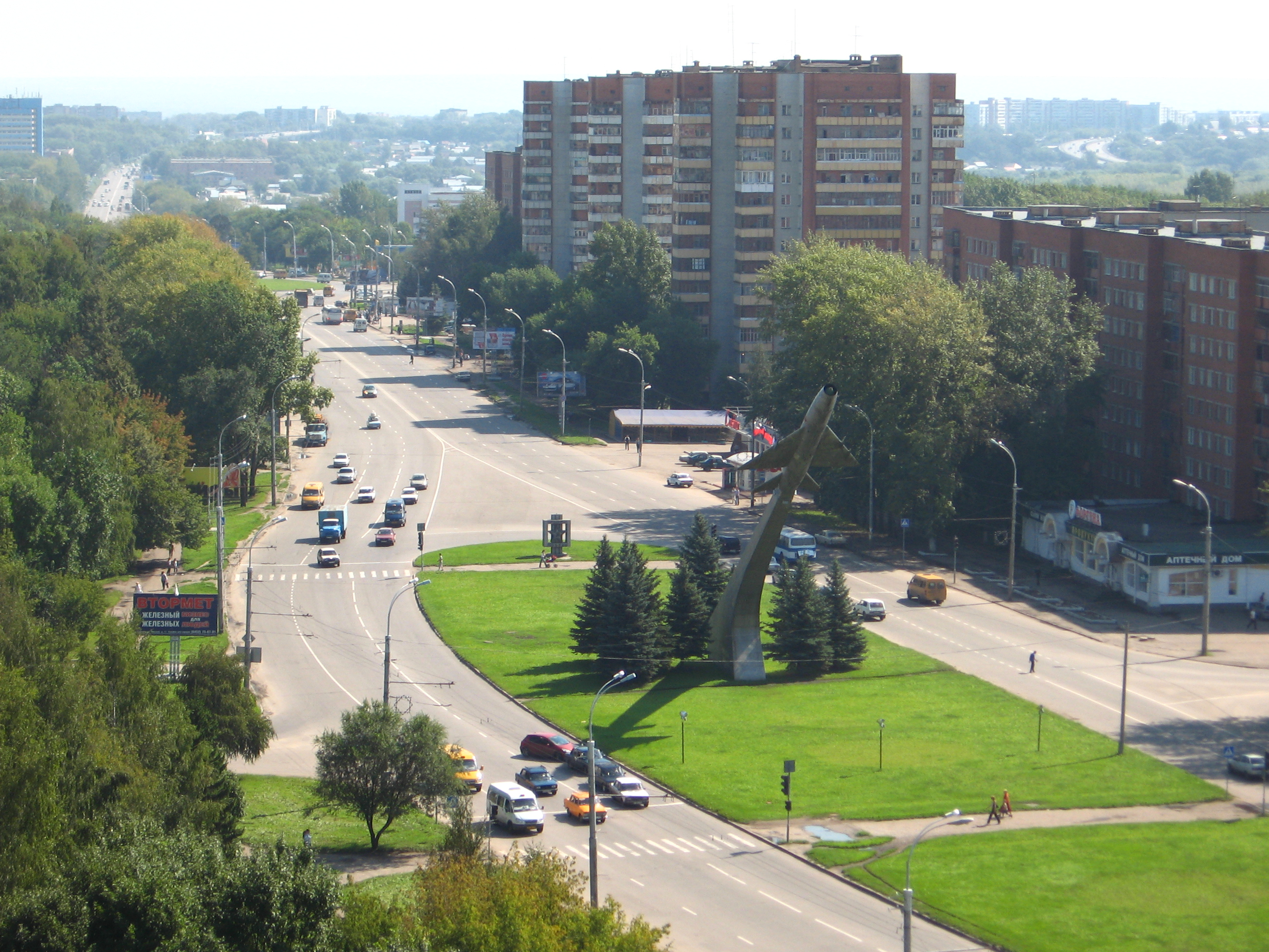 Самолёт